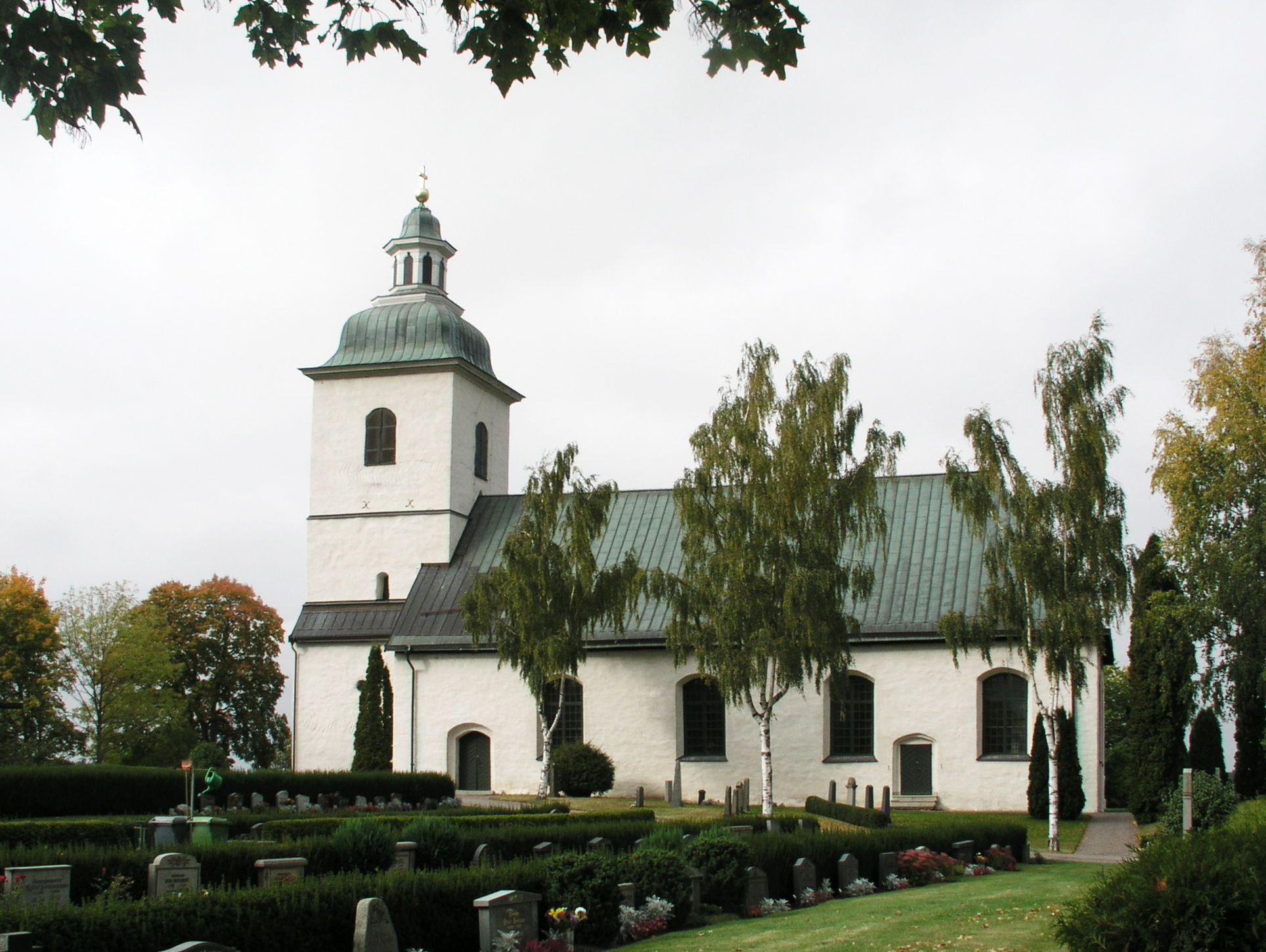 Bankekinds kyrka/church